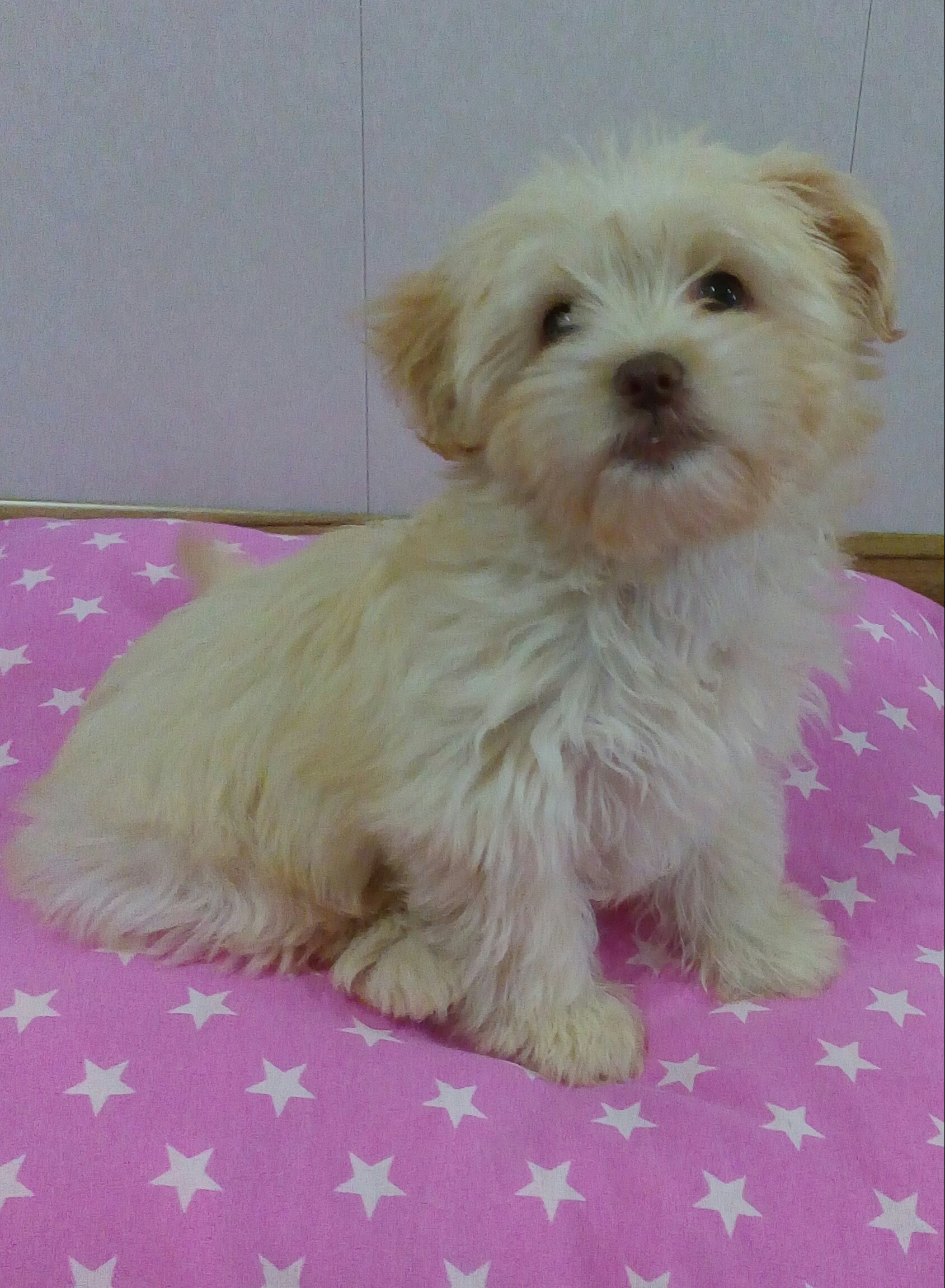 شیتزو تریر